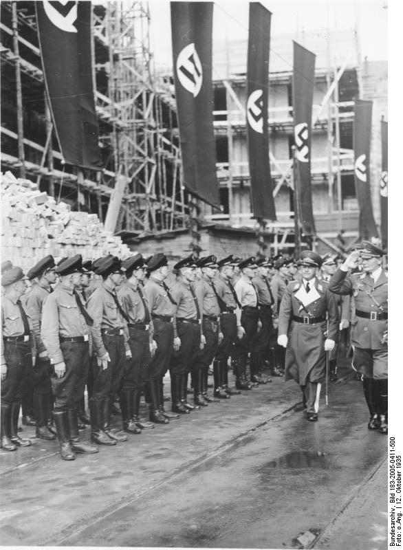 Richtfest des Reichsluftfahrtministeriums Reichsluftfahrtminister [Hermann] Göring schreitet, begleitet von Staatssekretär [Erhard] Milch, die Front der Formation ab.